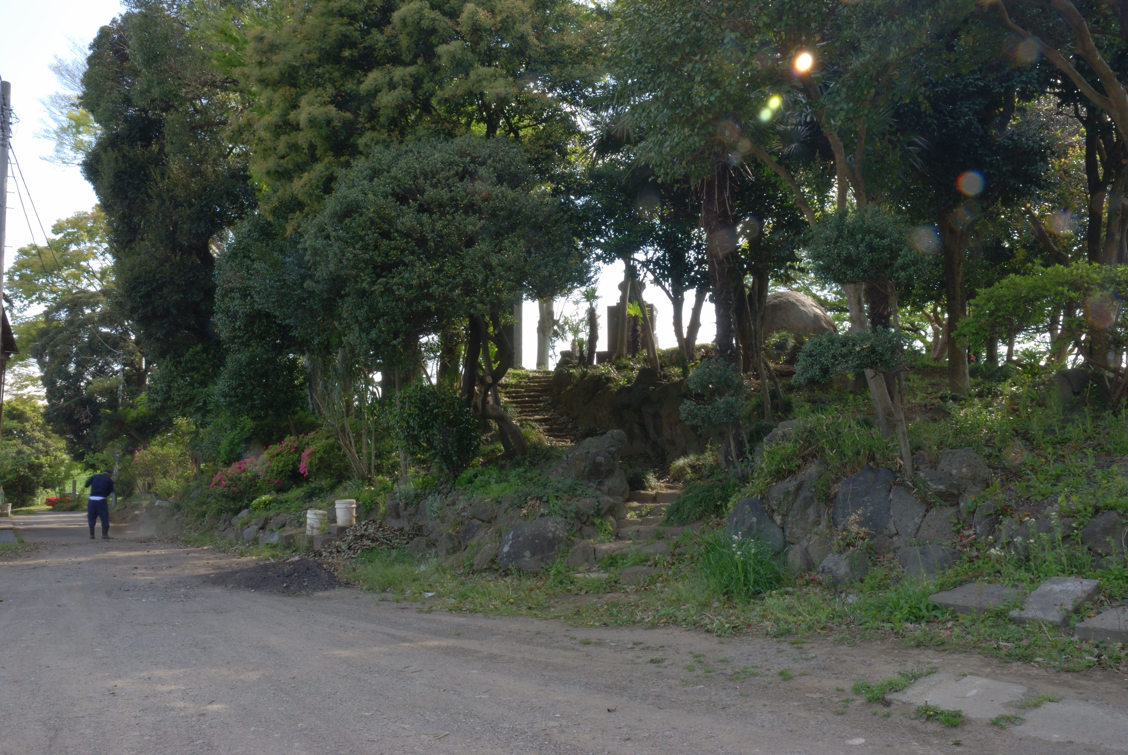 Kannonji dorui